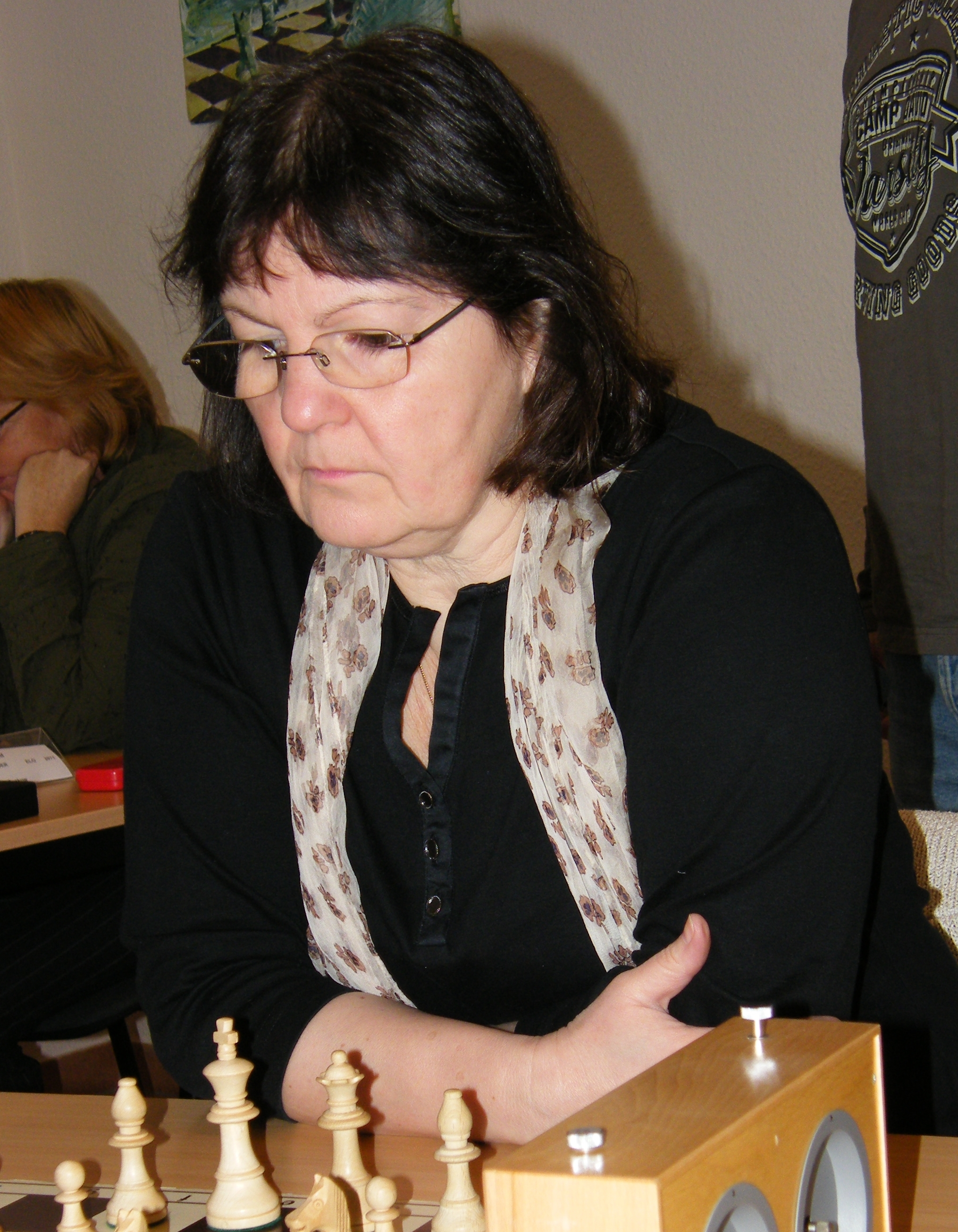 Annett Wagner-Michel bei einem Wettkampf der Frauenbundesliga in Berlin-Pankow